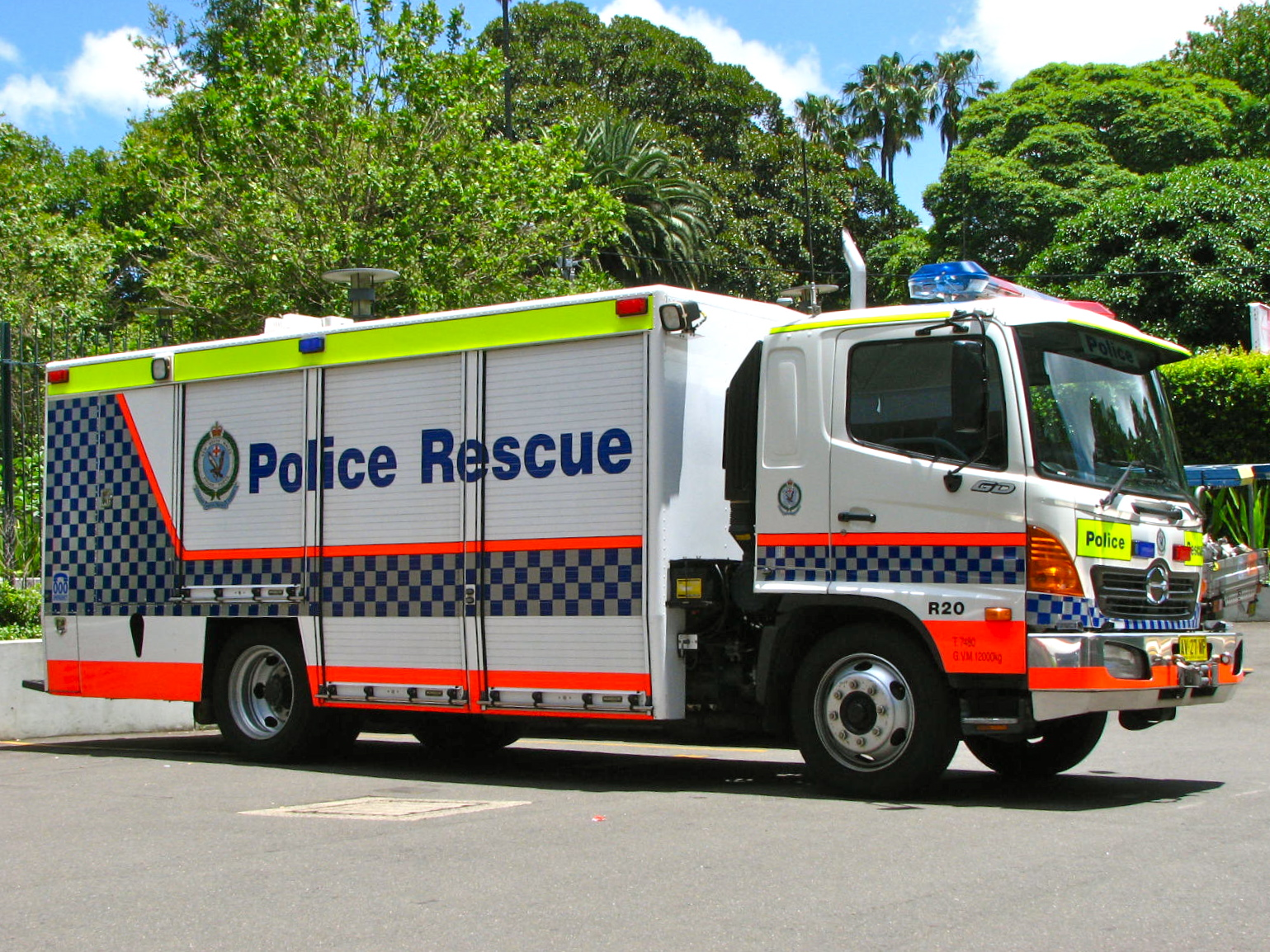 NSW Police Rescue squad Hino Rescue 20